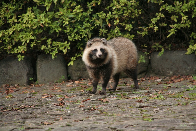 タヌキ